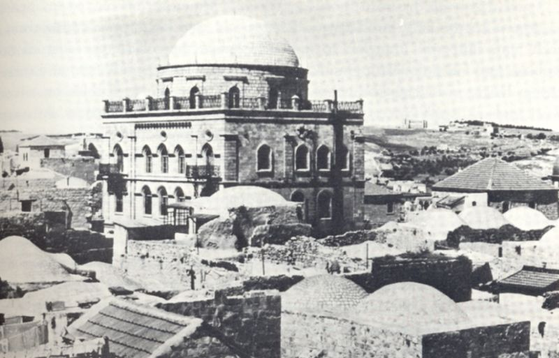 Tiferet Yisrael Synagogue, Jerusalem